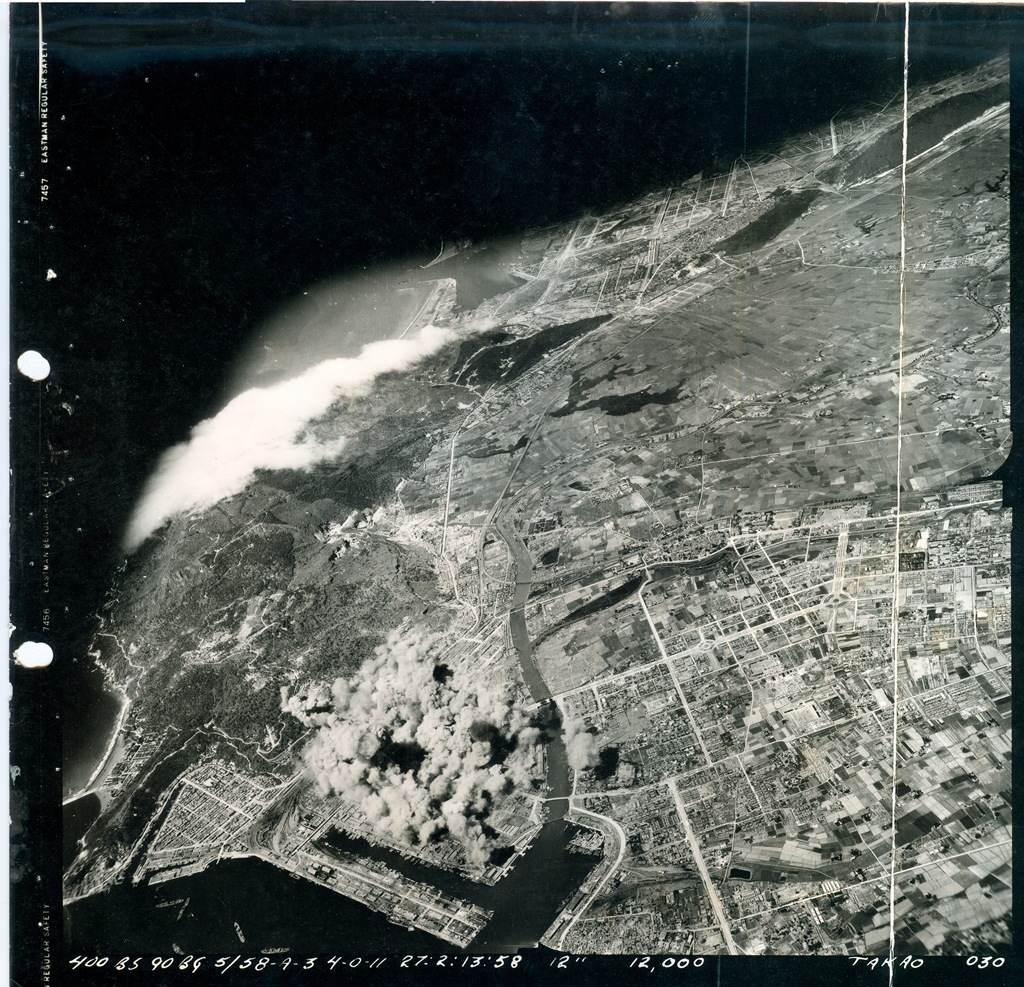 File link: [1]